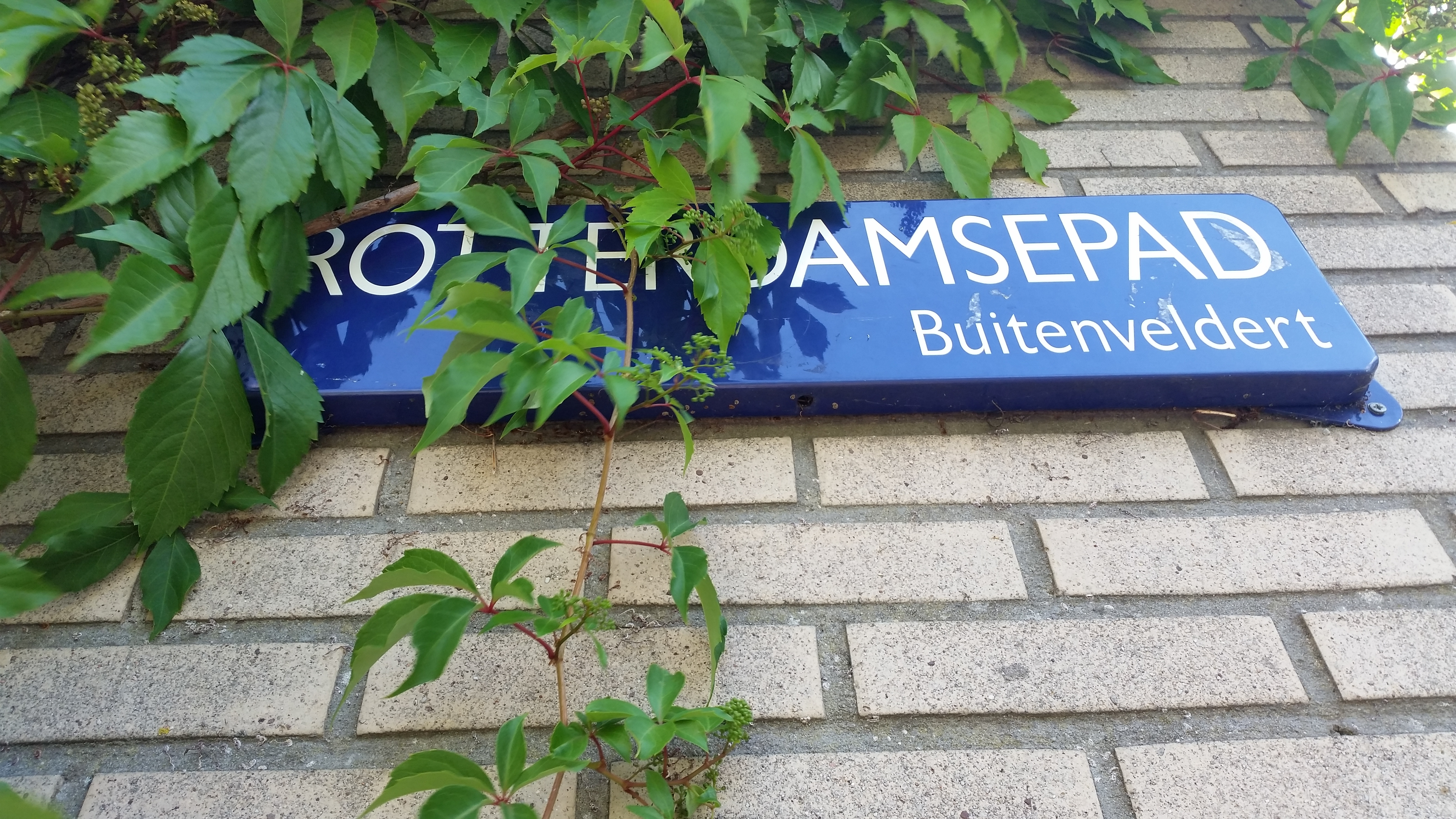 Rotterdamsepad, Buitenveldert